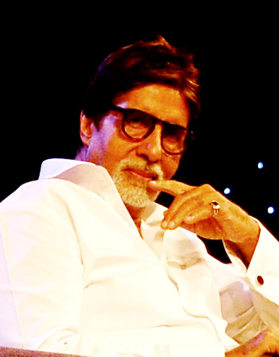 അമിതാഭ് ബച്ചൻ